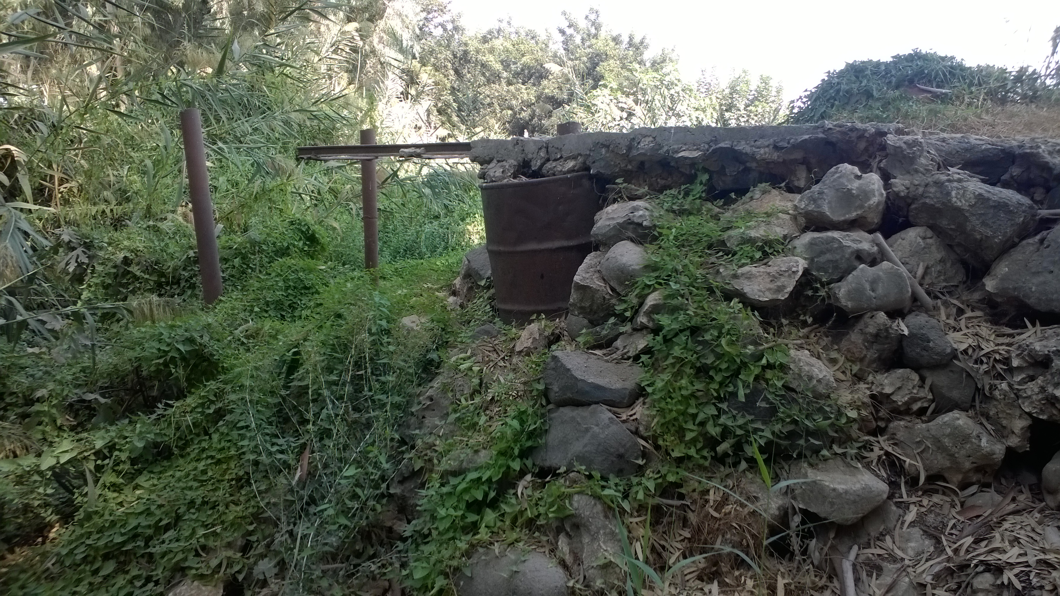 יסוד המעלה נוסדה בשנת 1883 של שפתו הדרום-מערבית של אגם החולה והייתה מן המושבות הראשונות שהוקמו על ידי אנשי העלייה הראשונה, והמושבה השנייה שהוקמה בגליל העליון לאחר ראש פינה.